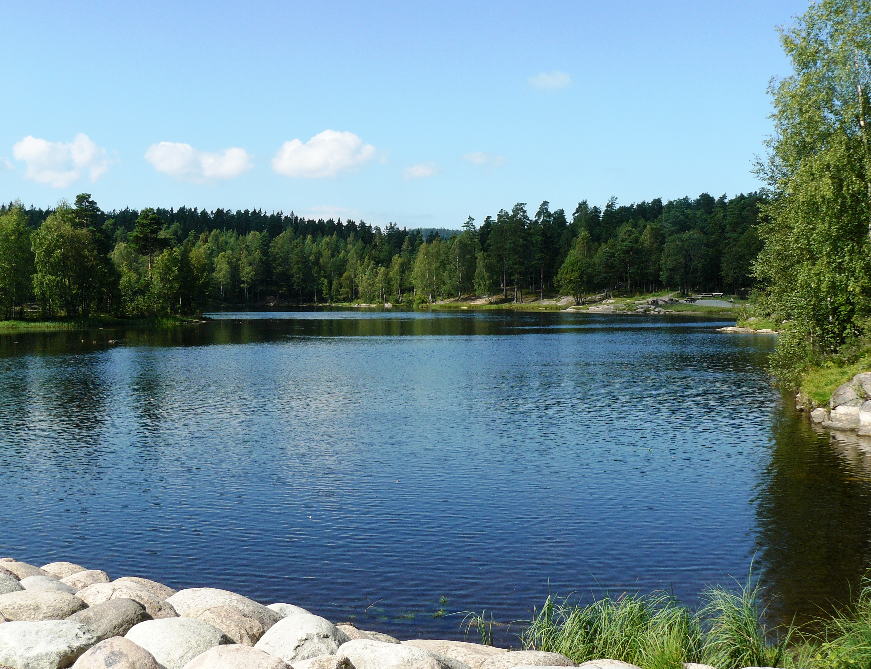 Vesletjern,_Ammerud,_Oslo_2.jpg